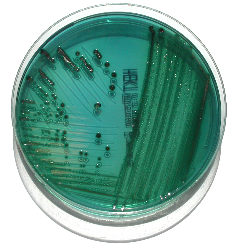 Colonie de S.typhimurium sur gélose Hektoen (lactose-, H2S+) (image personnelle) Philippinjl 10 juin 2003 à 14:18 (CET)